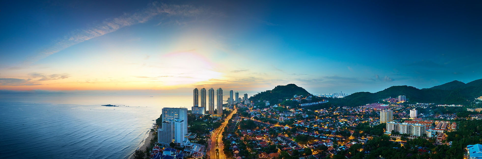 Aerial evening scene of Penang Island - Tanjung Bungah